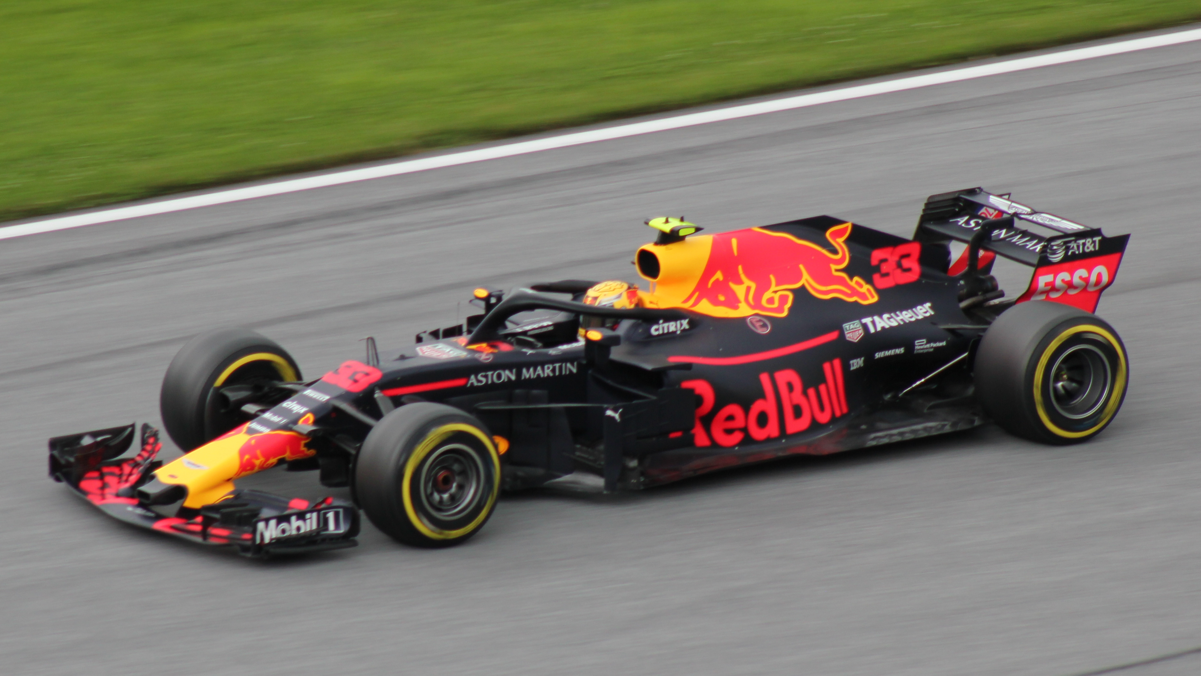 33 Verstappen beim Rennwochenende in Österreich 2018